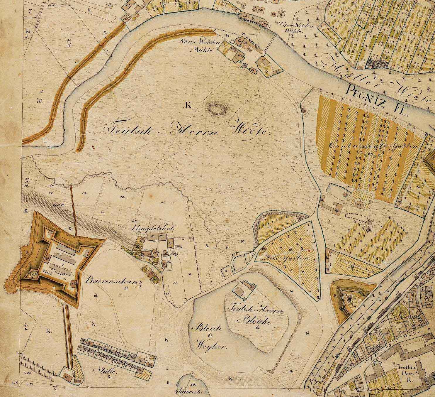 Nürnberg, Kleinweidenmühle, Deutschherrnwiese, Kontumazgarten, Bärenschanze, Himpfelshof, Deutschherrnbleiche. Ausschnitt aus einem Plan der Steuer-Kataster-Kommission (später Katasterbureau) des Königreichs Bayern